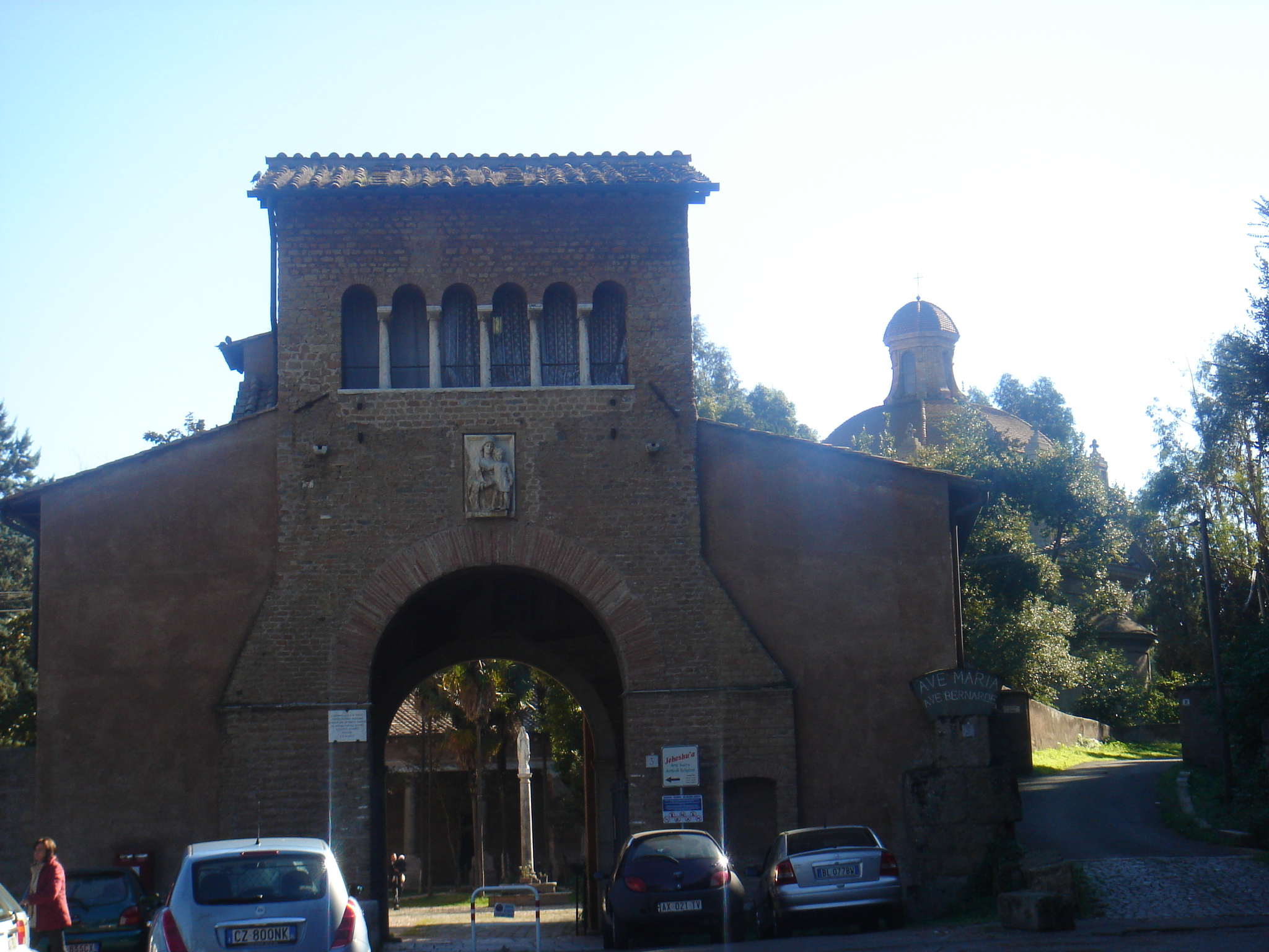 Roma, Abbazia delle Tre Fontane: ingresso ("Arco di Carlo Magno")